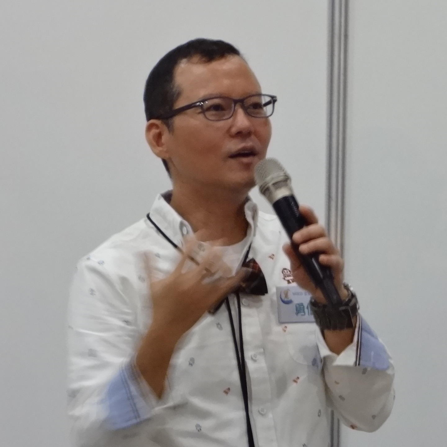 2013臺中動漫節，臺灣配音員李勇擔任「親子動漫畫講座」講師。